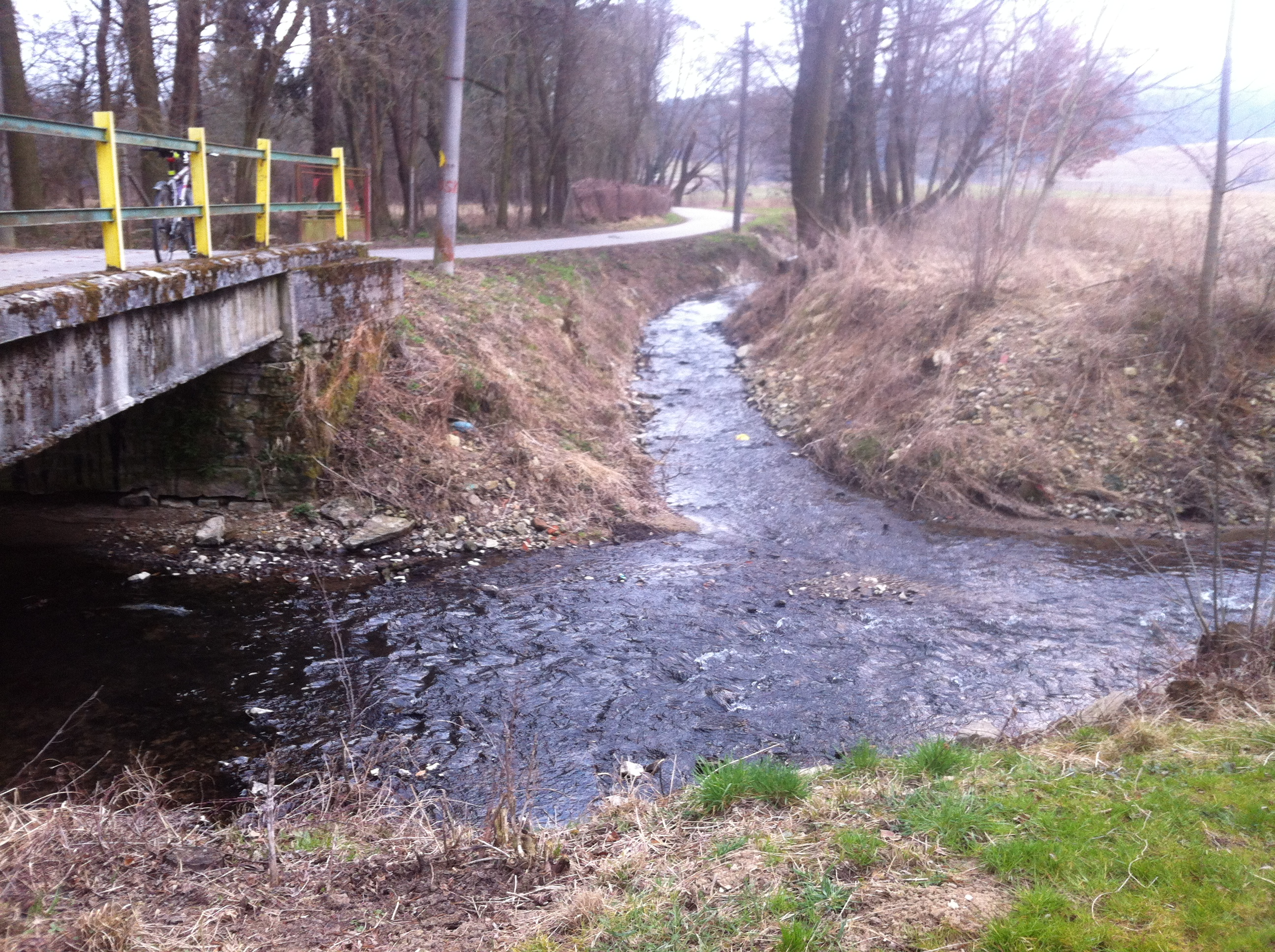 ústie